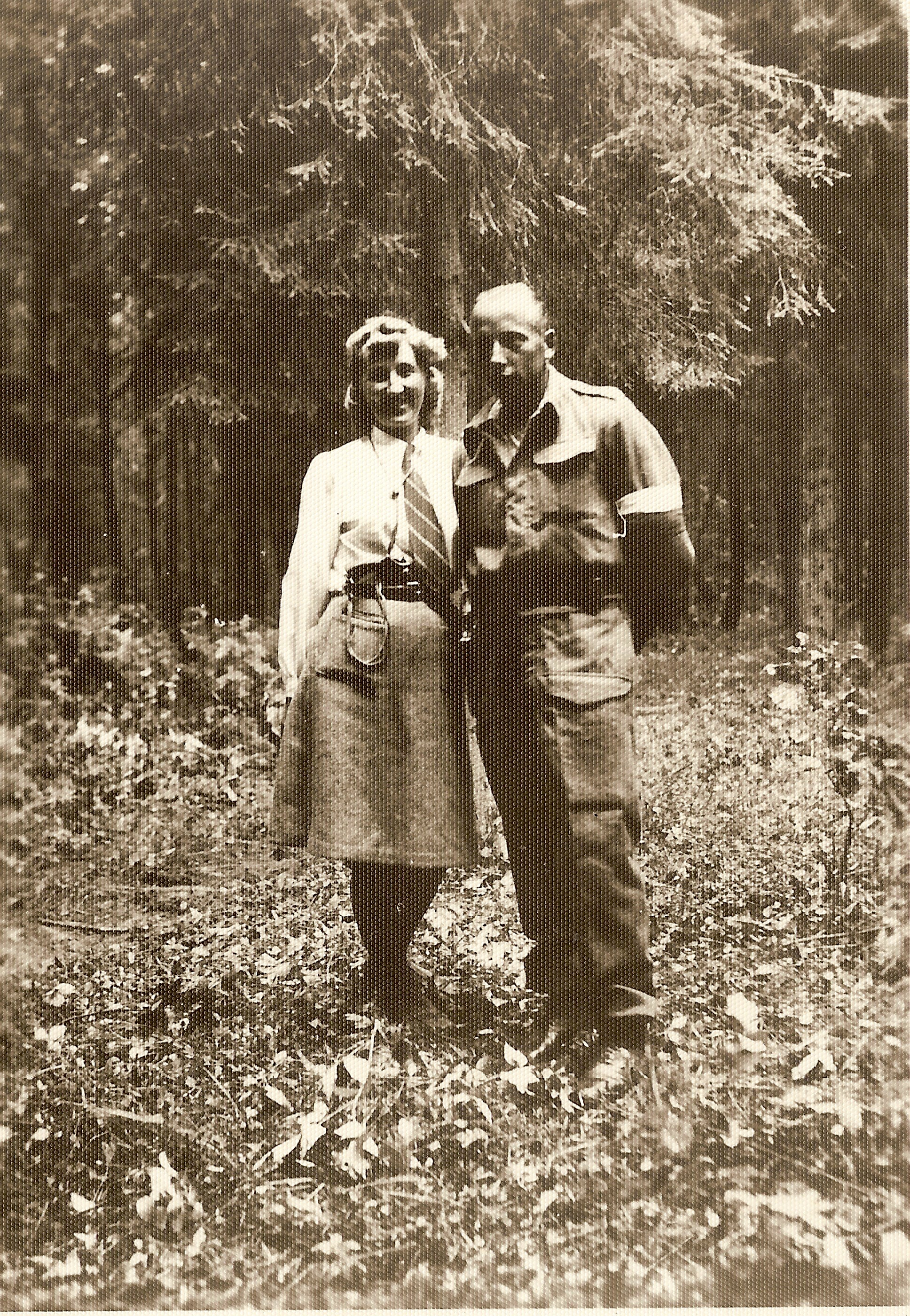 Żołnierze Oddziału Leśnego "Lech". Rodzice chrzestni sztandaru: sanitariuszka Józefa Proszowska "Bożena" i plut. Jan Welc "Ogień"